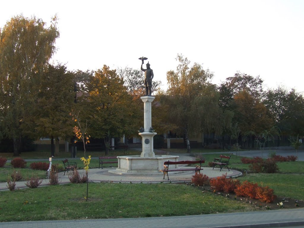 A város központ.